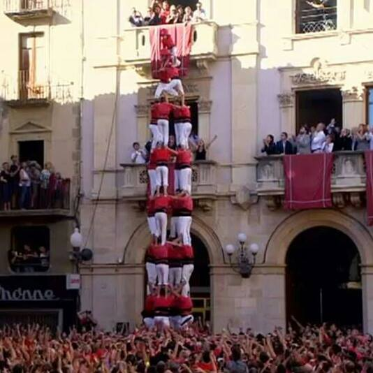 Primer 4 de 9 sense folre descarregat a Valls, fet per la Colla Joves Xiquets de Valls en la diada de Santa Úrsula el 27 d'octubre del 2013.